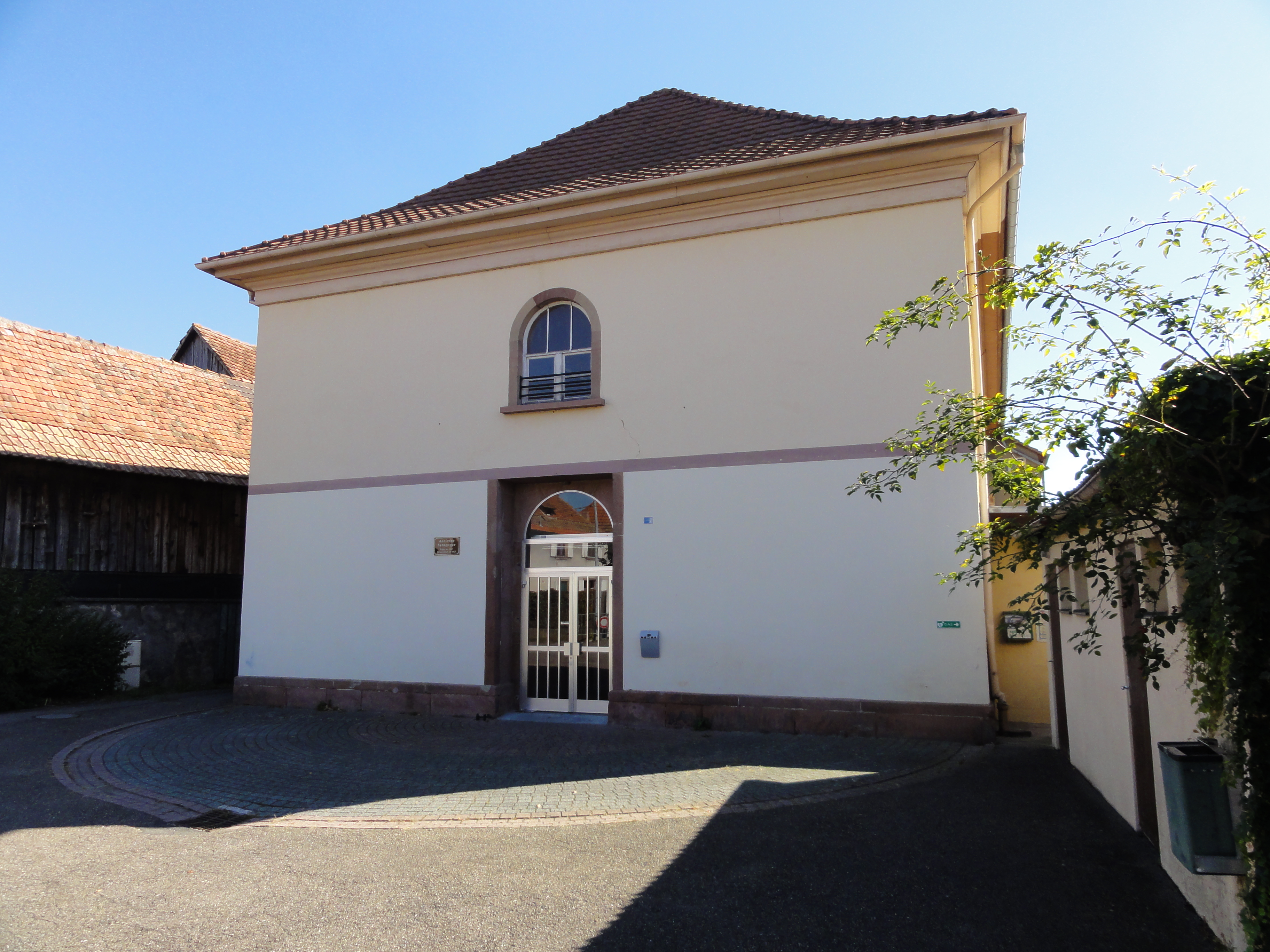 Alsace, Bas-Rhin, Muttersholtz, Ancienne synagogue (1838), actuellement salle de gymnastique, 4 rue des Tilleuls: .